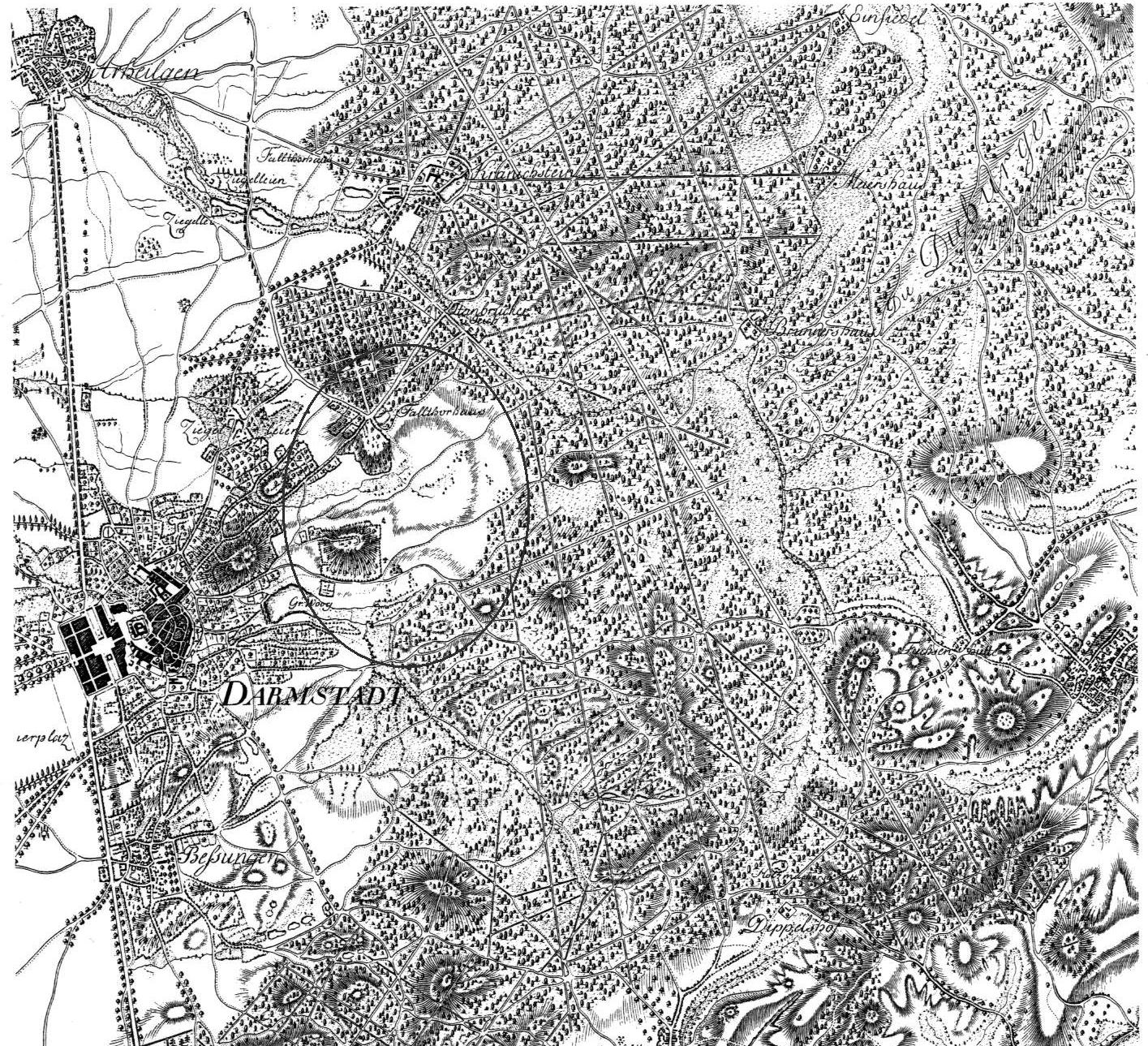 Haas'sche Karte von Darmstadt